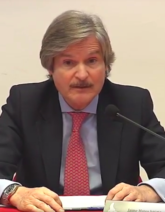 Testimonios víctimas del terrorismo. Jornada "Víctimas y sociedad ante el desafío del terrorismo".